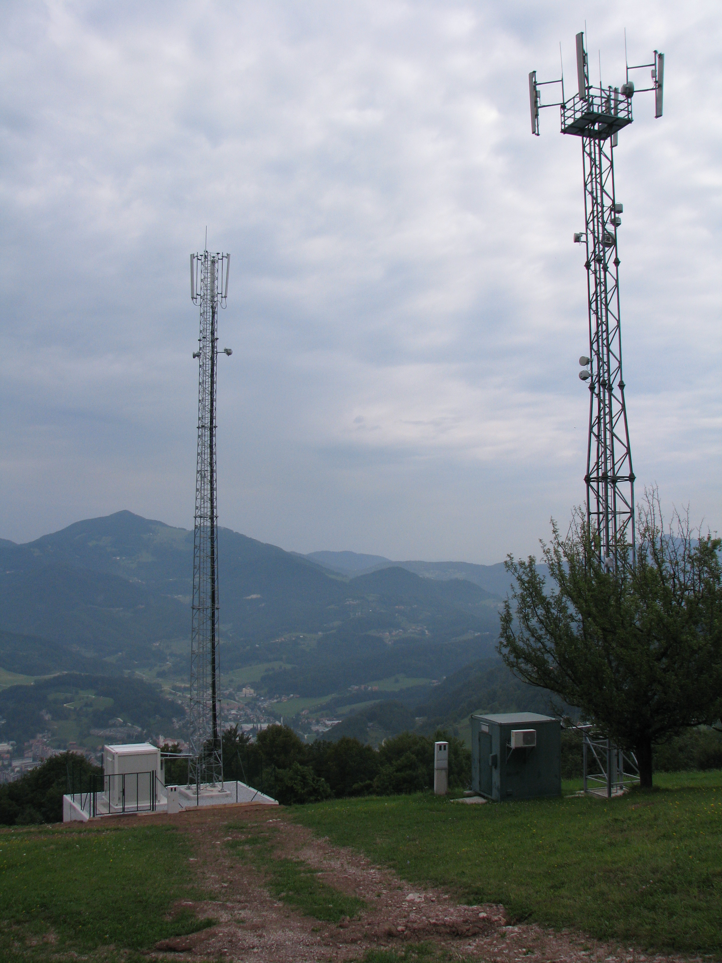 Oddajnika za mobilno telefonijo na Grašici, v ozadju mesto Zagorje ob Savi